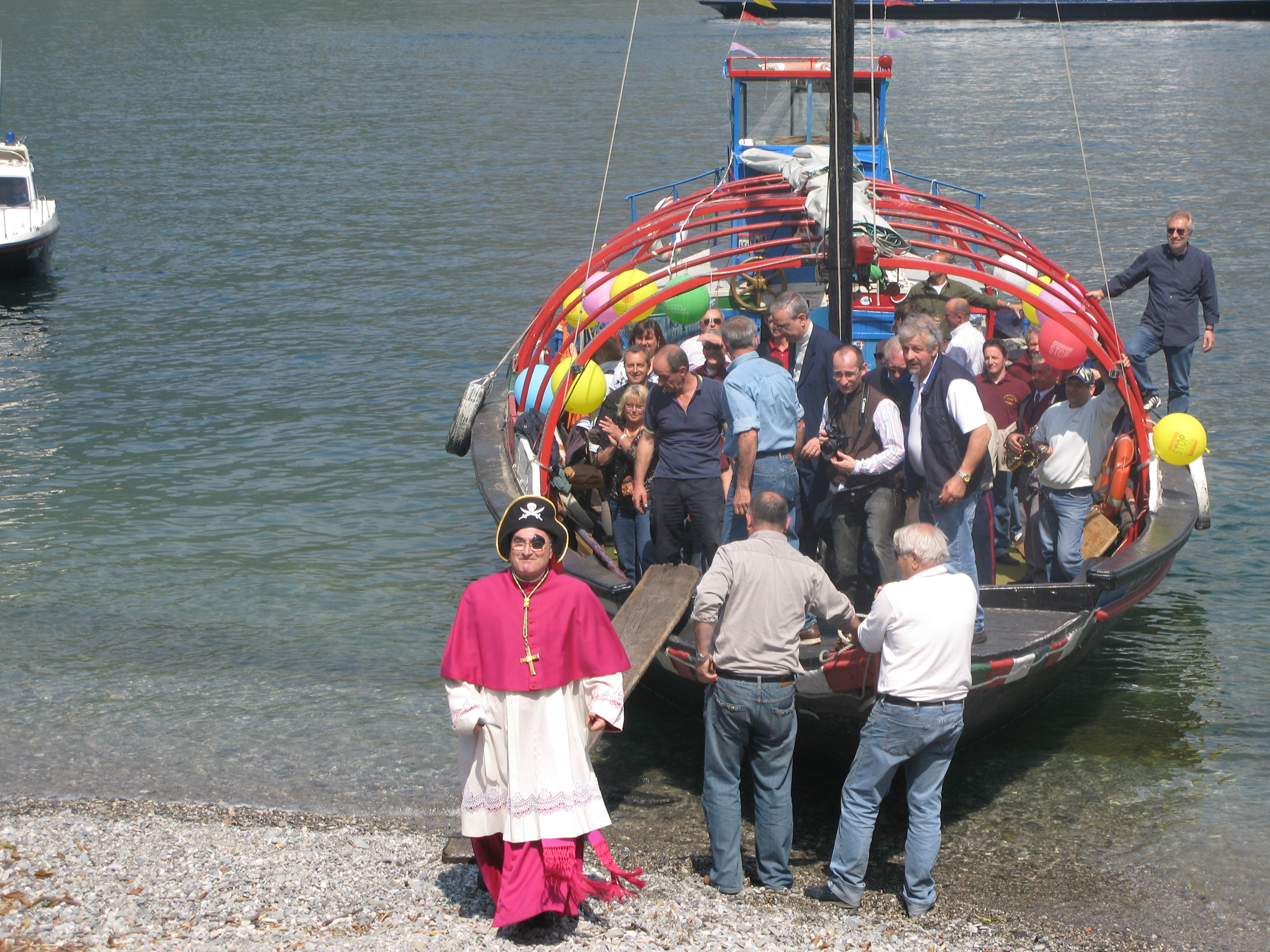 il vescovo Diego Coletti travestito da pirata al Molo 14 del 2008